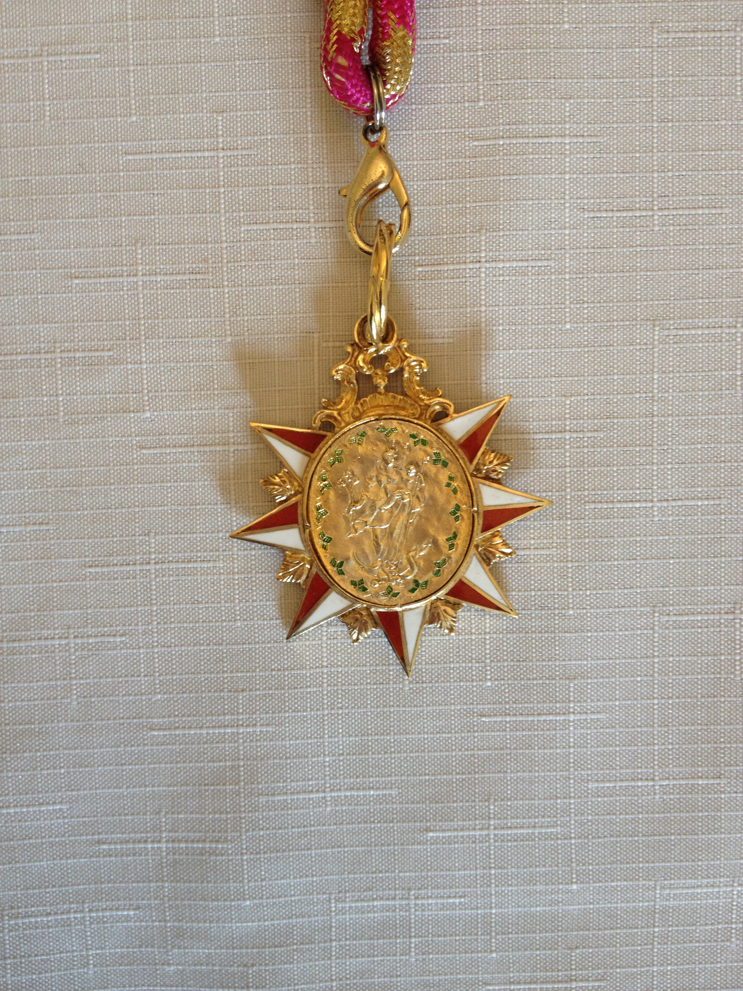 Numisma kanovníků katedrální kapituly sv. Štěpána v Litoměřicích.